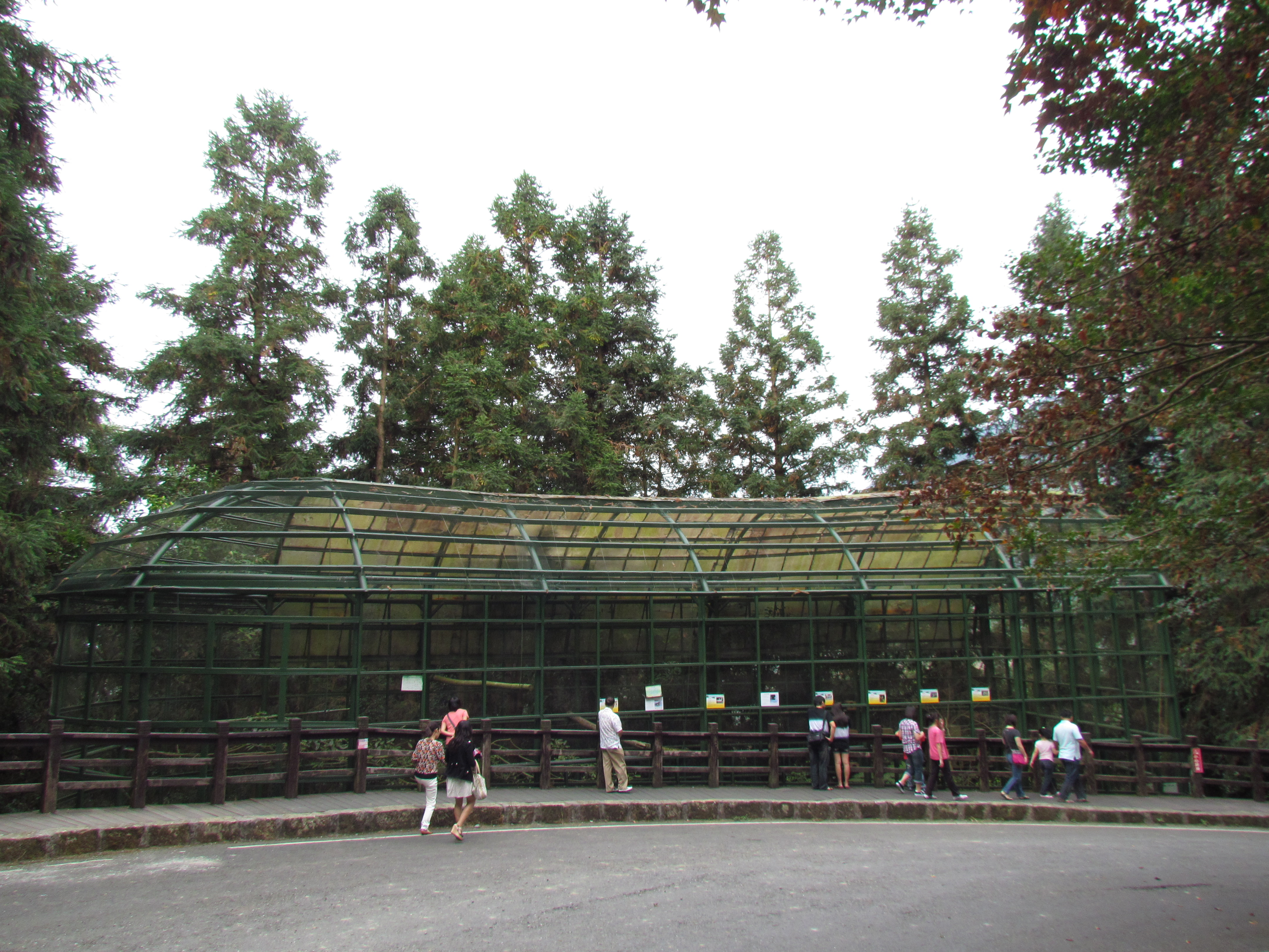 鳳凰谷鳥園內部